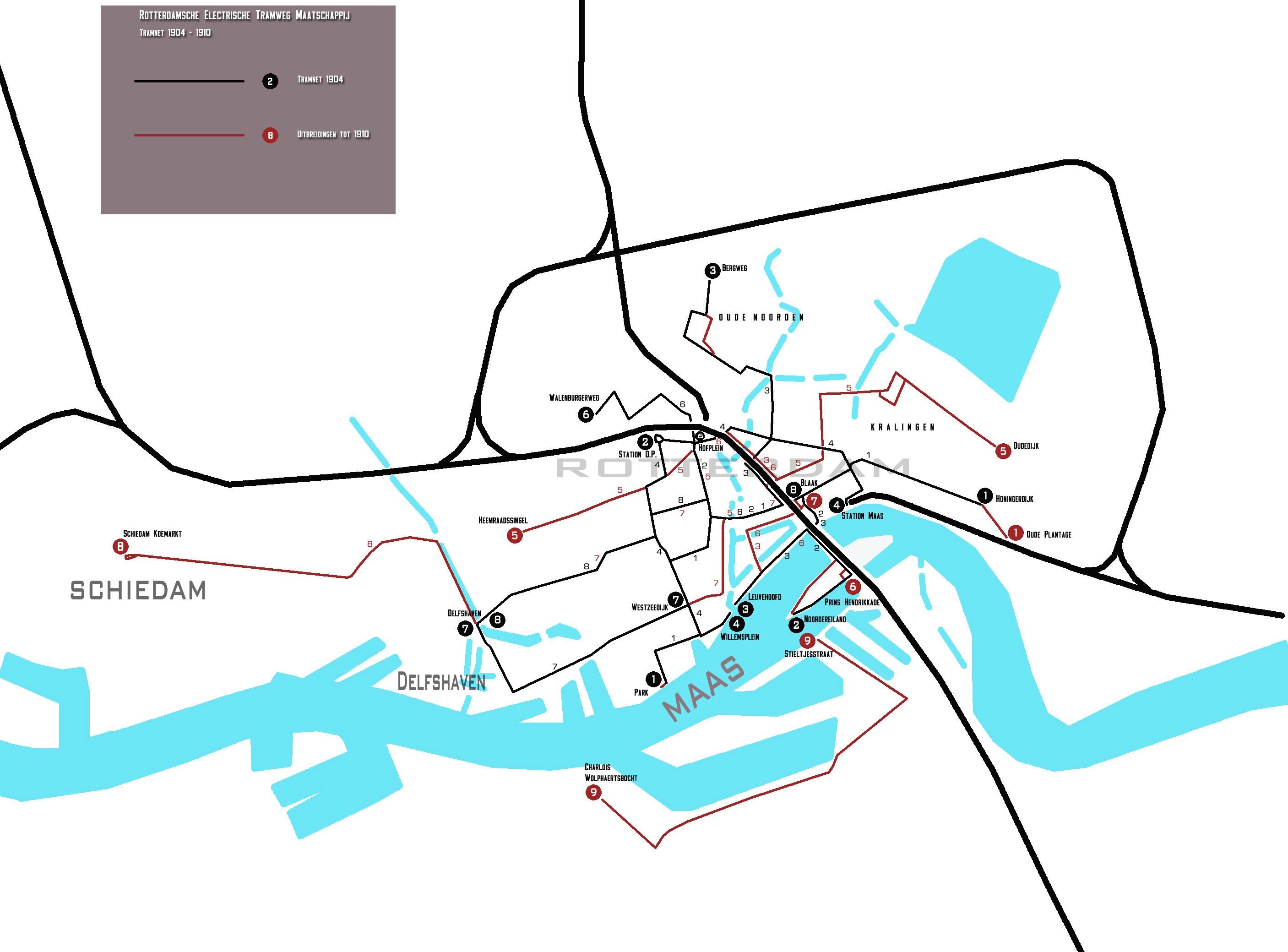 Rotterdams tramnet 1904-1910